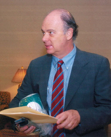 Enrigue Krauze==